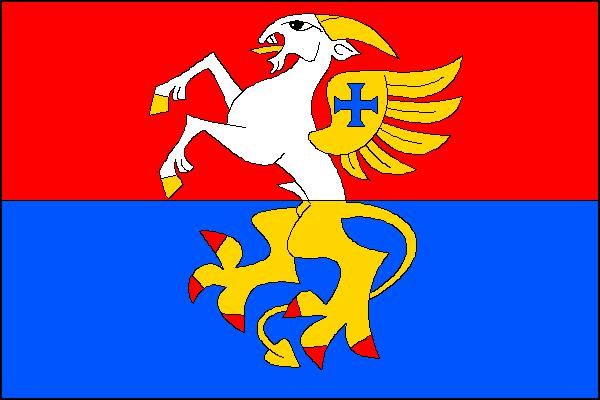 Vlajka obce Jamné